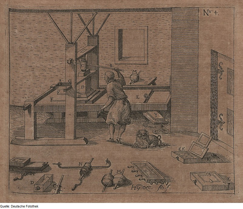 Original image description from the Deutsche Fotothek Mechanik & Presse & Schraubenpresse & Buchdruck